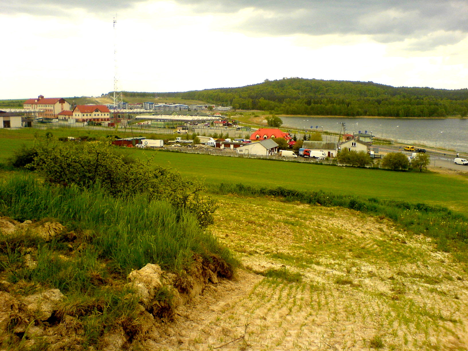 Drogowe przejście graniczne Hrebenne-Rawa Ruska. Widok ogólny, z przodu część polska, w tle ukraińska.